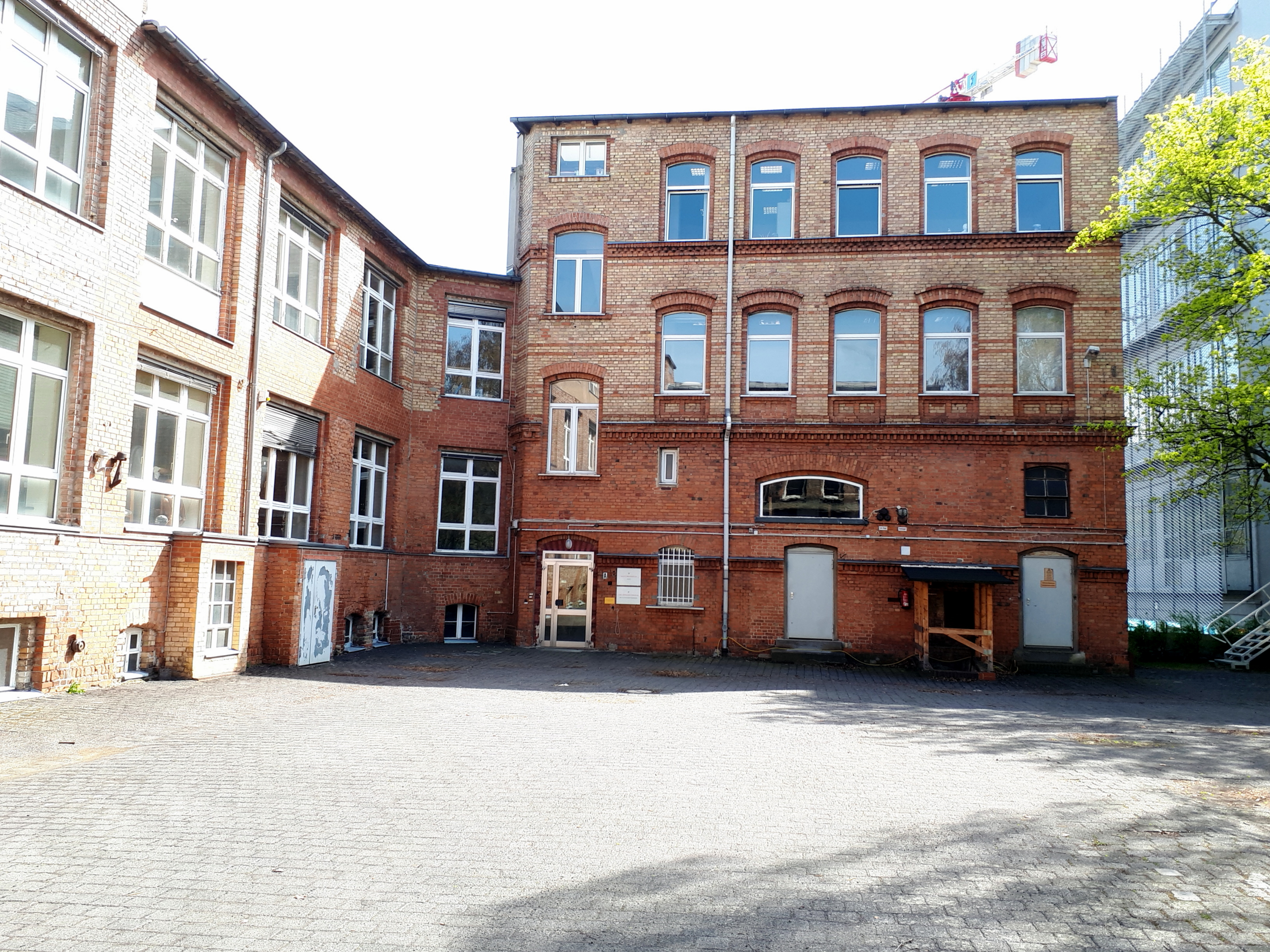 Charlottenburg Gutenbergstraße Gallus Druckerei